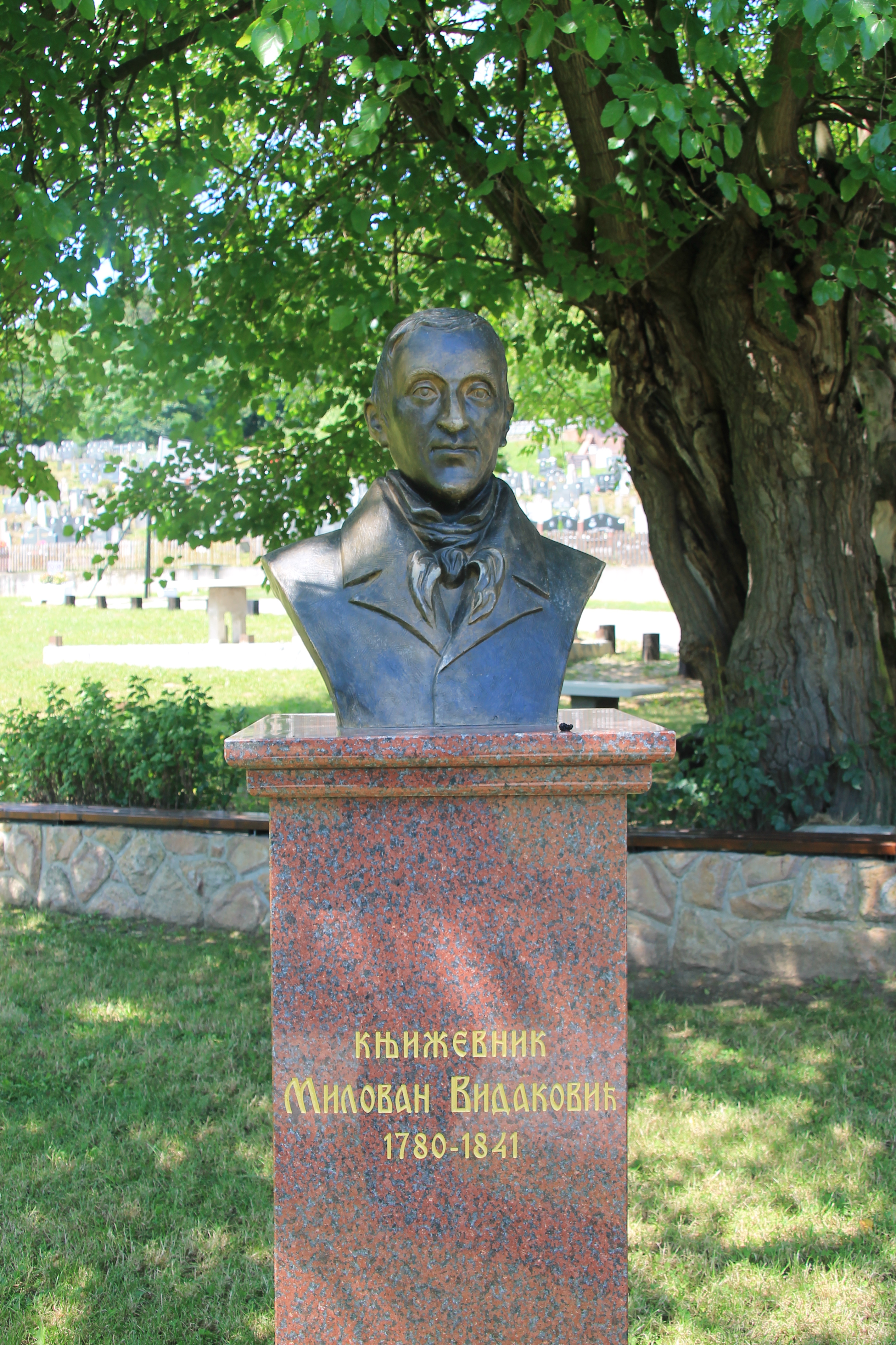 Crkva Sv. Petra i Pavla (Nemenikuće)